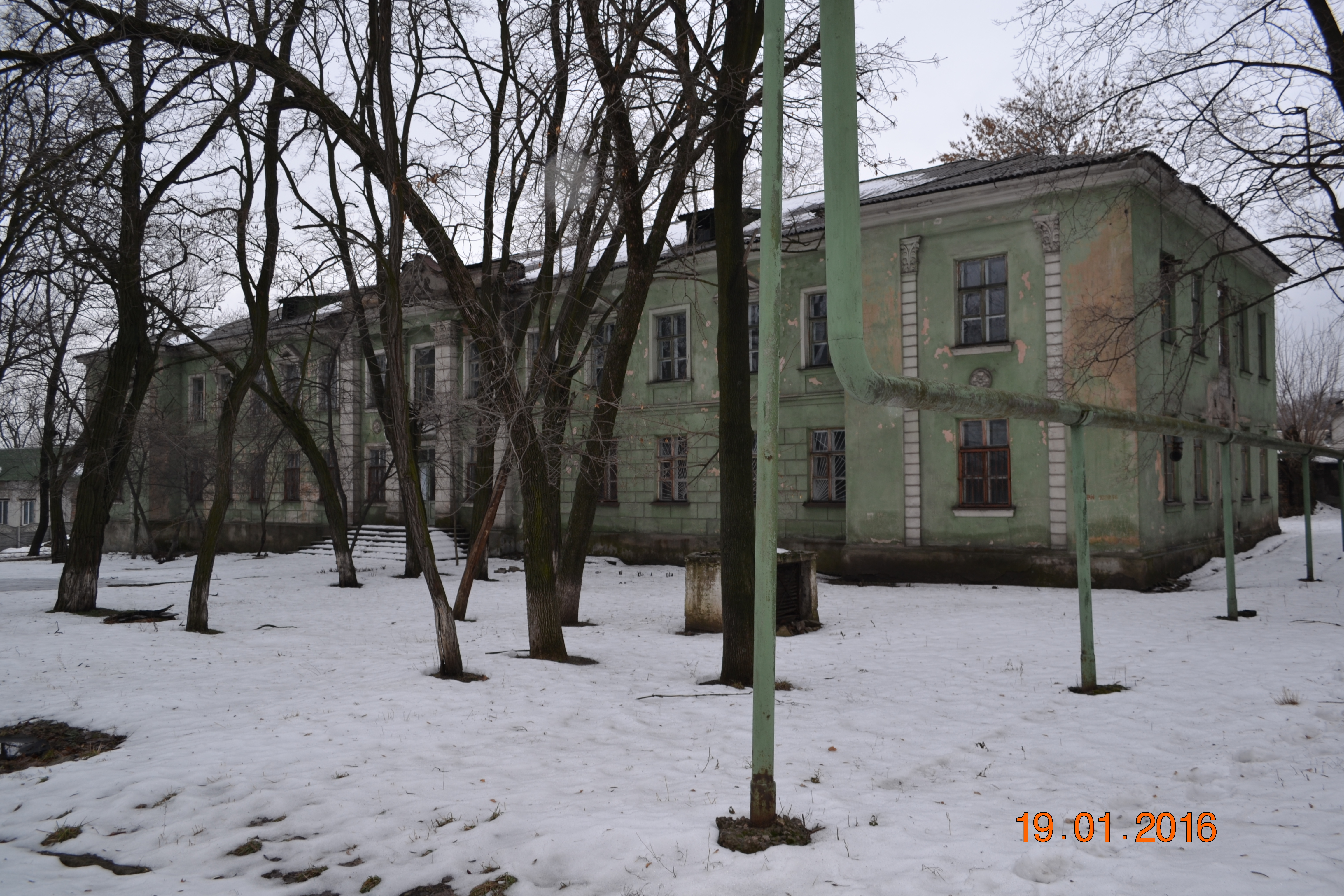 МакНИИ. Здание отдела борьбы с внезапными выбросами угля и газа (ныне - лаборатории по борьбе с газодинамическими явлениями).